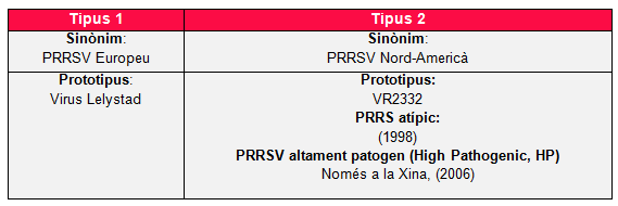 PRRSV